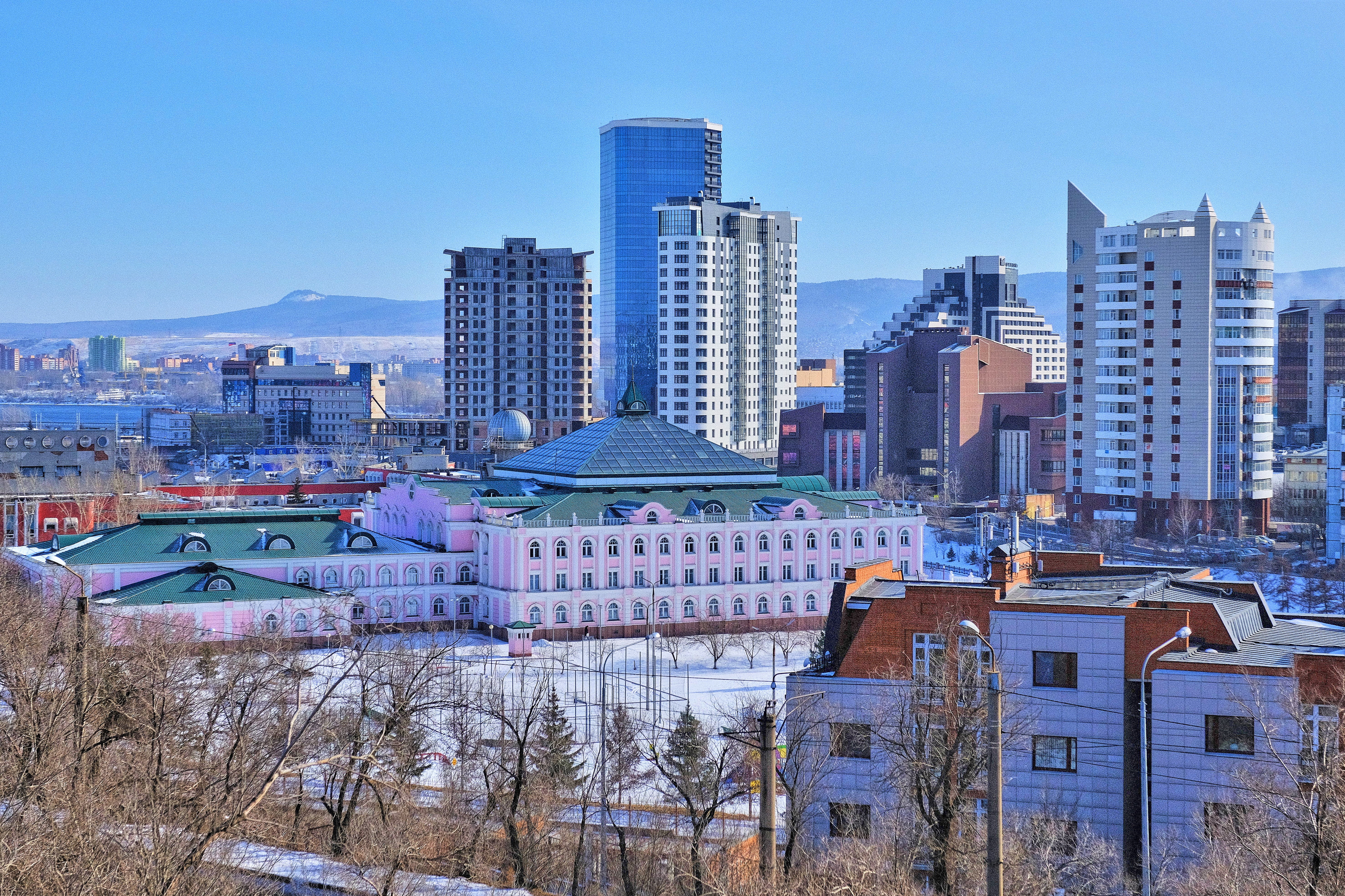 Жилые дома в Красноярске